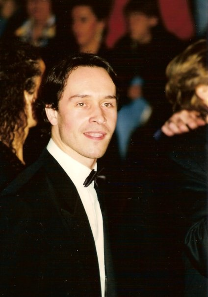 Manuel Blanc au festival de Cannes